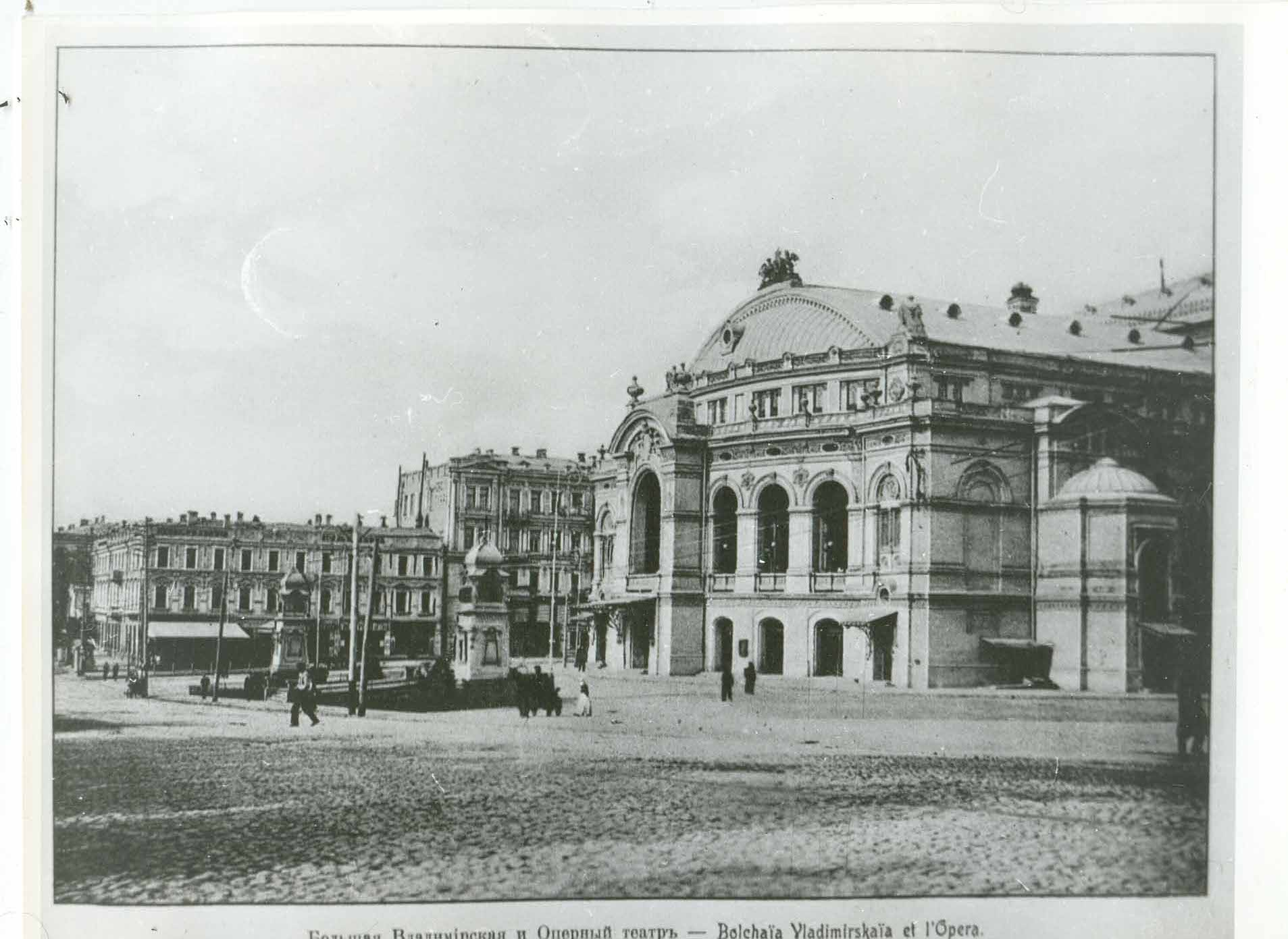 Национальный оперный театр им Шевченко г. Киев